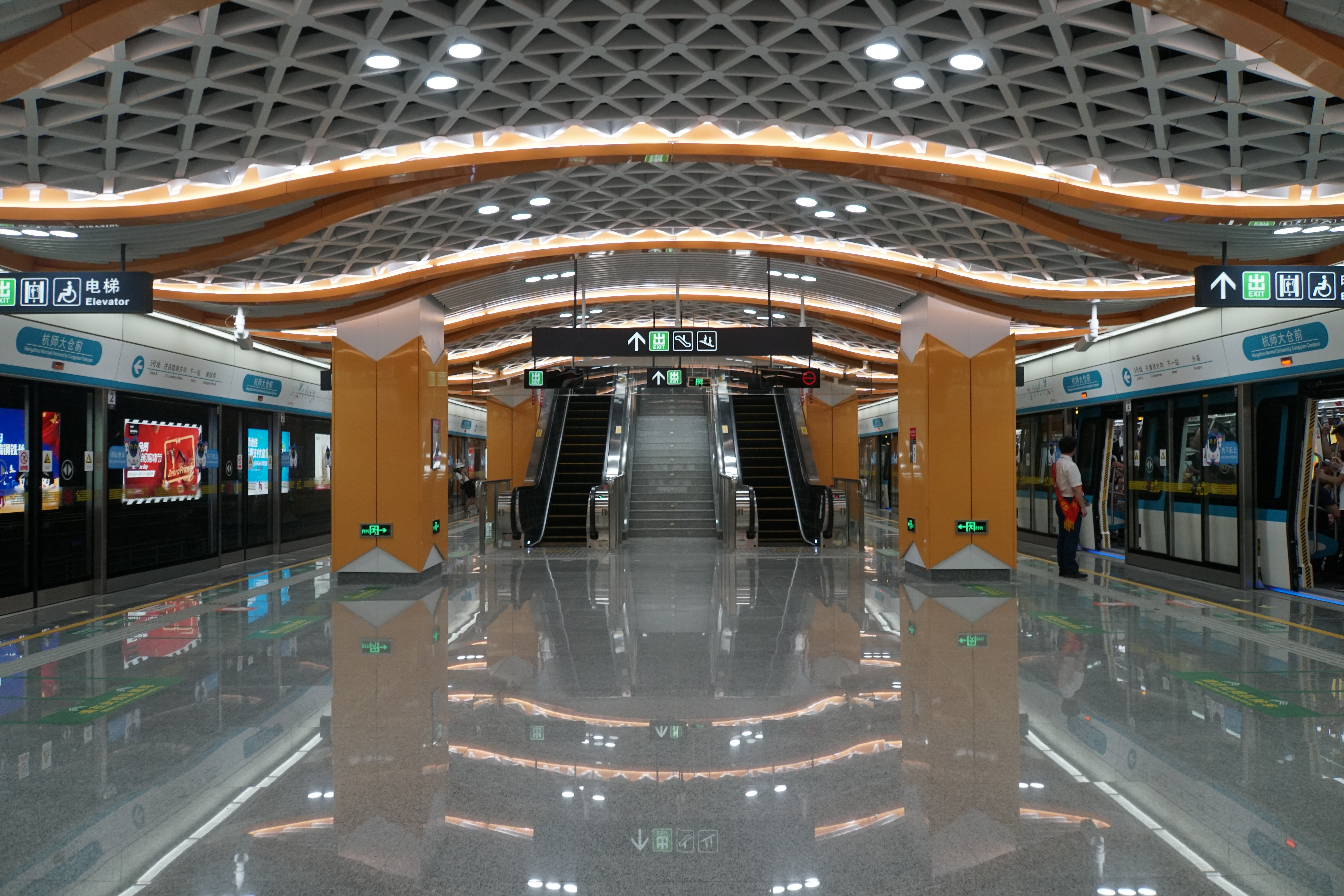 杭师大仓前站台